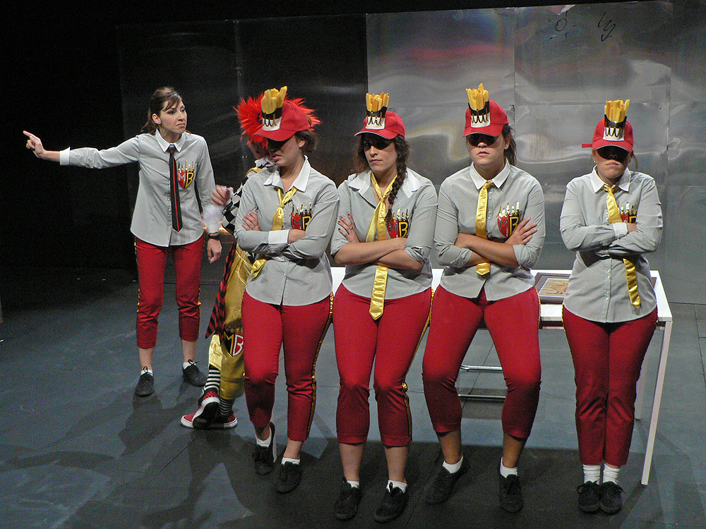 Escena de l'obra de teatre "McBeth con queso", escrita i dirigida per Marc Angelet, representada per la companyia "La Guapa", amb vestuari realitzat per Iztok Hrga. La fotografia va ser feta a la representació que va tenir lloc al Teatre del Raval de Barcelona, el 30 d'octubre de 2010.